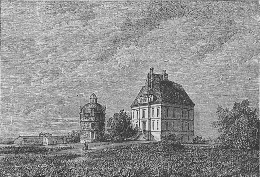 Illustration du Château Latour dans l'ouvrage Bordeaux et ses vins (6ème édition) de Charles Cocks et Edouard Féret publié en 1893